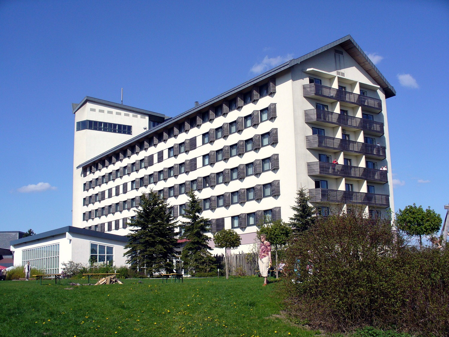 Ringberghotel